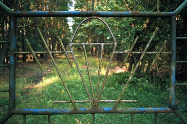 Kasernentor 3. Garde-Spezialaufklärungsbrigade, Neuthymen